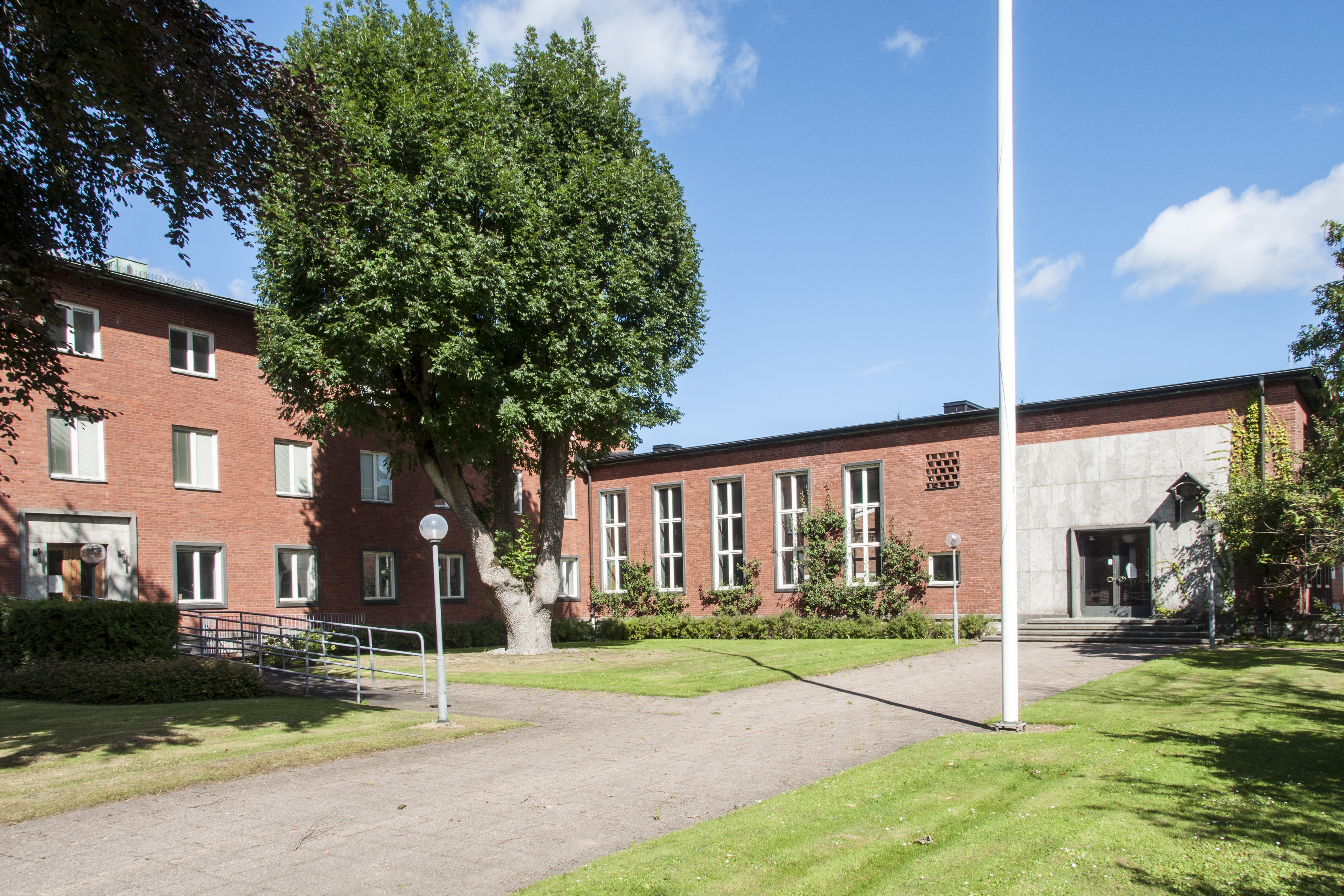 Rönnen 8, Skolgatan 18 Skövde. Byggnadsår 1936-38, arkitekt Gotthard Ålander, byggherre tingshusbyggnadsskyldige i Gudhems, Kåkinds och Skövde stads domsagor.